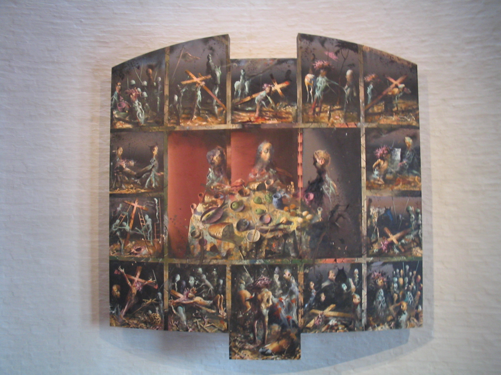 Konnerud kirke, altertavlenb